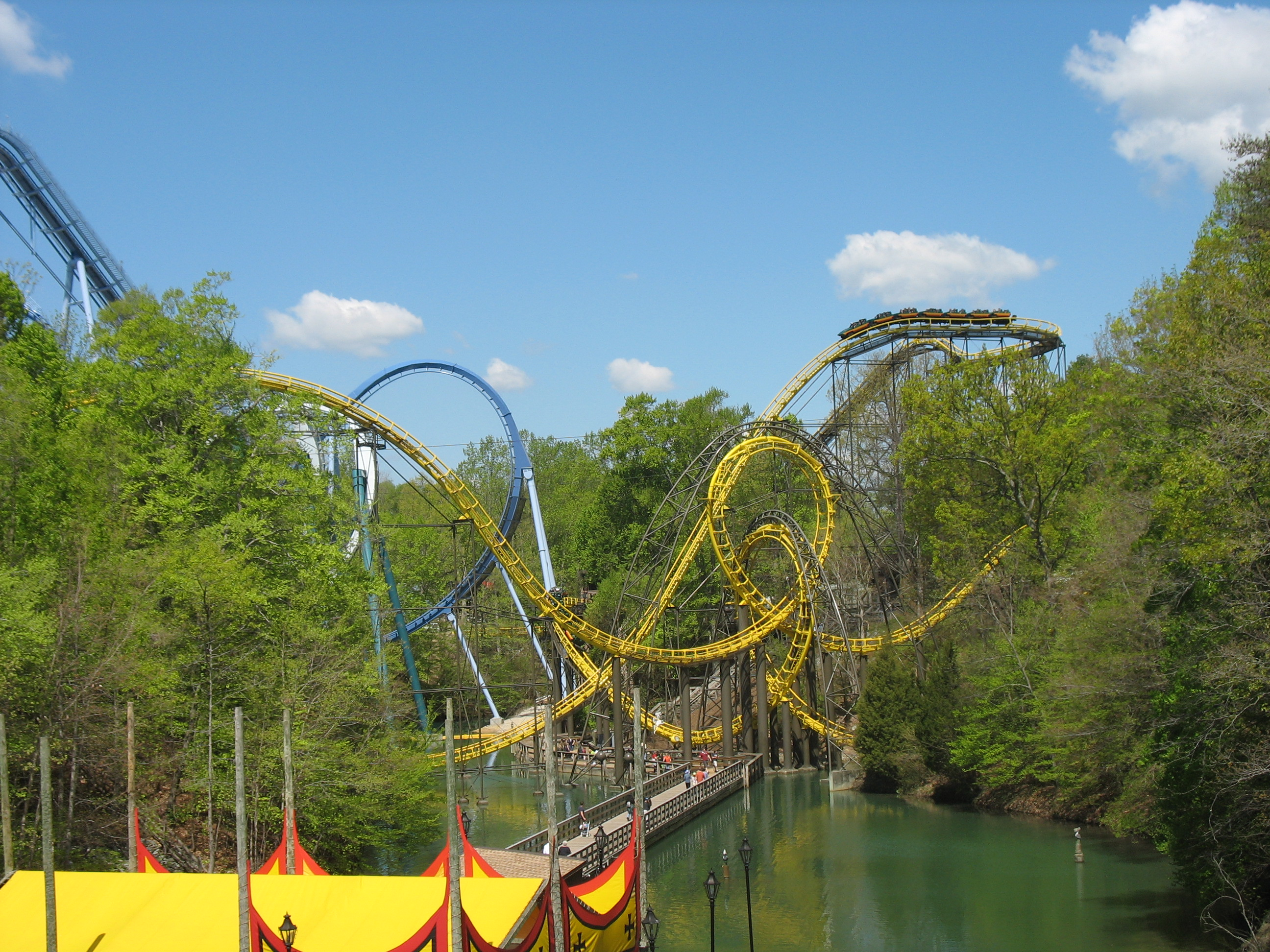 Loch Ness Monster , montagnes russes à Busch Gardens Europe